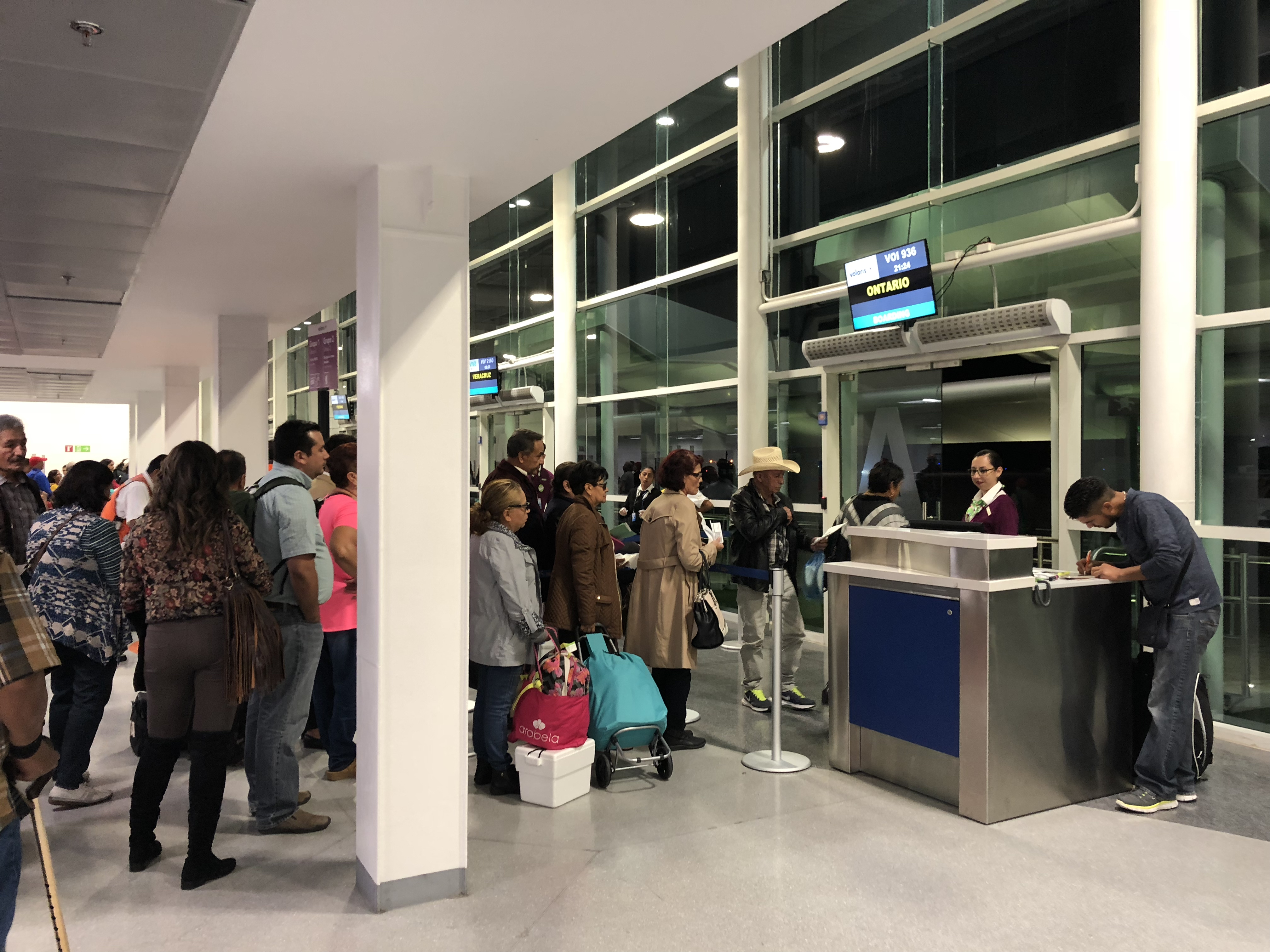 Sala A del Aeropuerto Internacional de Guadalajara.